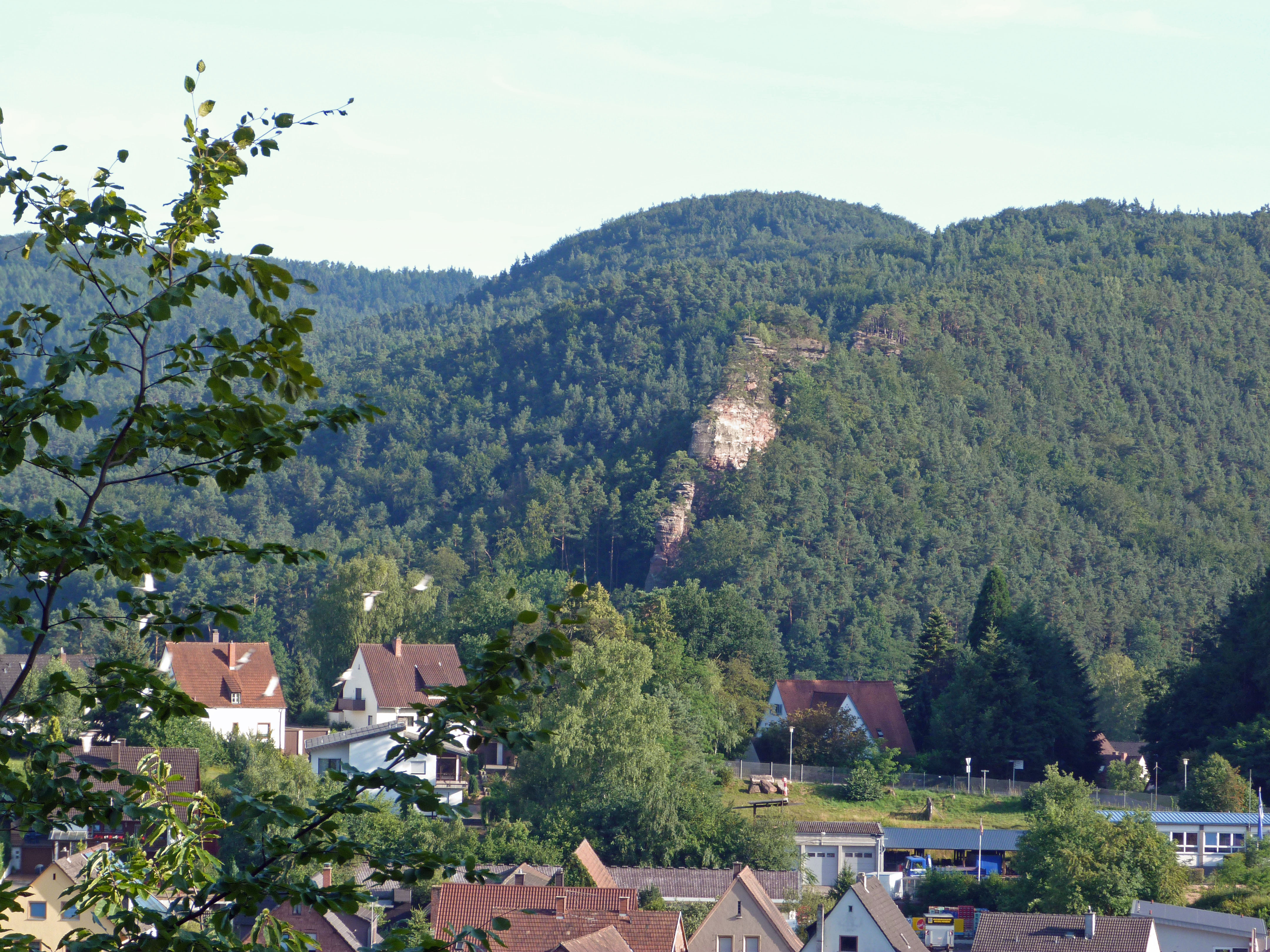 Burghalderfelsen über Hauenstein/Pfalz